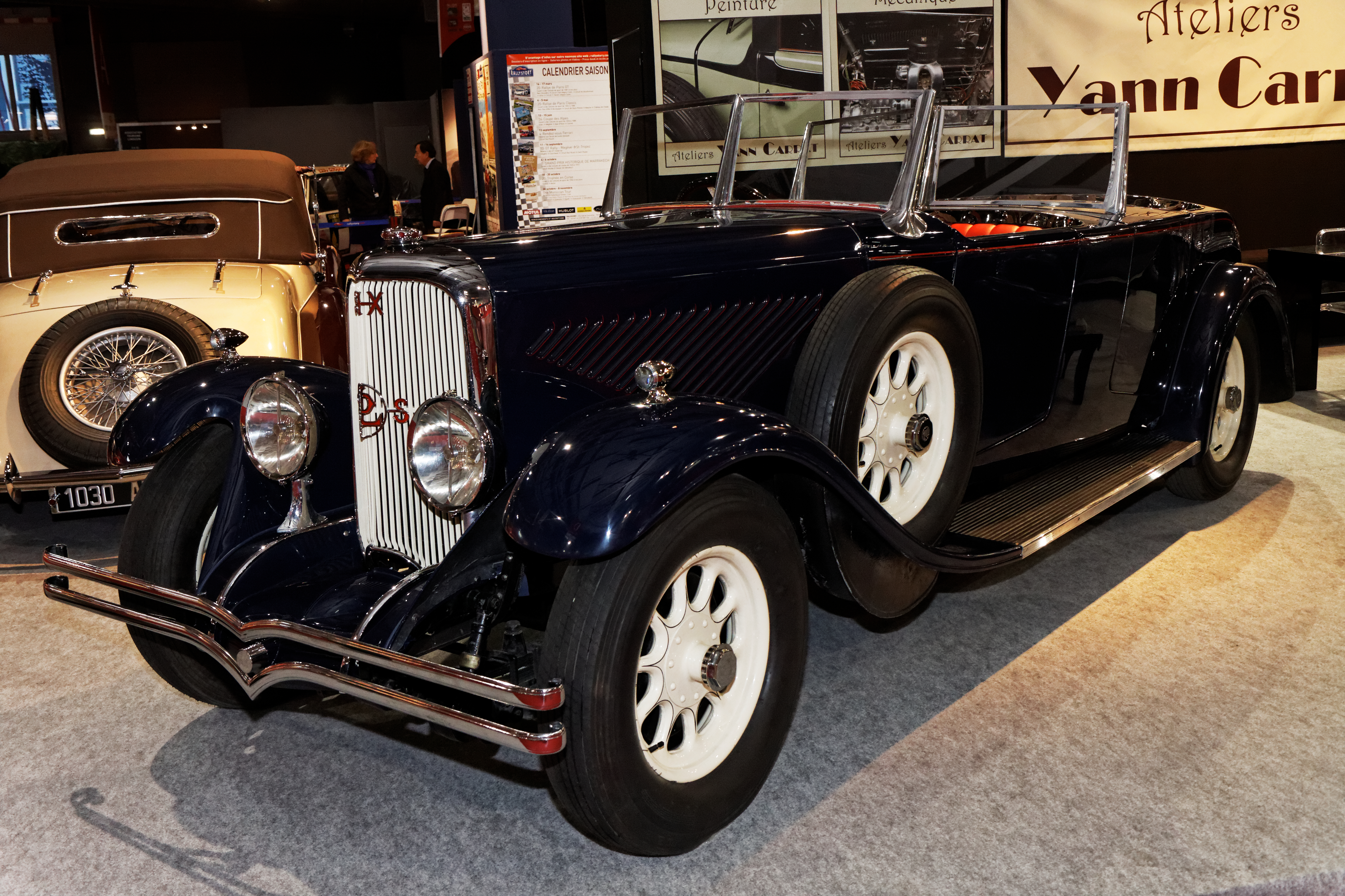 Une Panhard et Levassor X66 cabriolet présentée lors du salon Retromobile 2013.